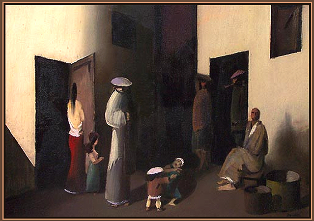 Idősebb Benedek Jenő (Kecskemét, 1906. január 16. – Budapest, 1987. július 19.) magyar festő Idegen című olajfestménye, 1982 - 70x100 cm